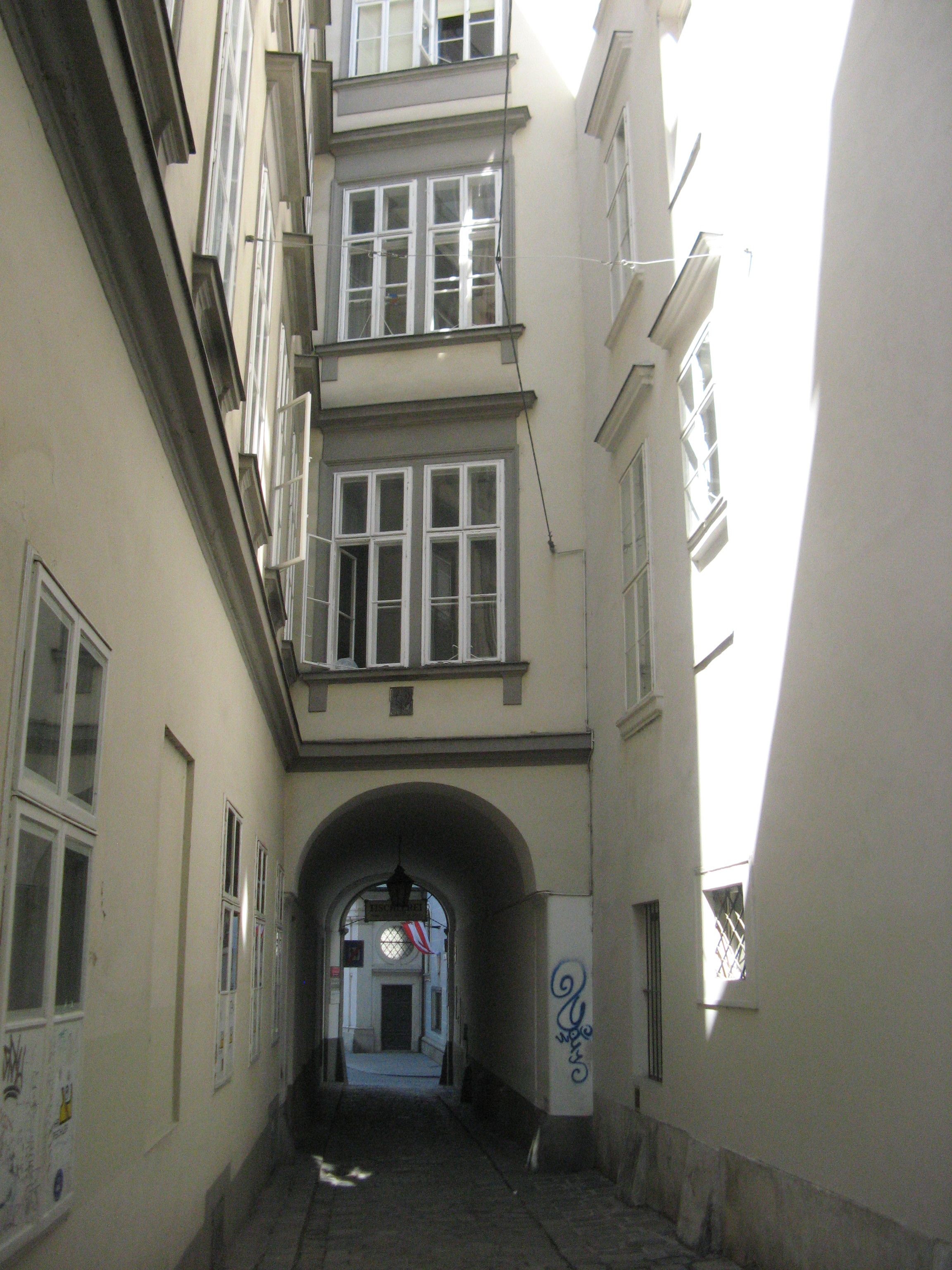 Überbauung der Ballgasse bei der Einmündung in den Franziskanerplatz, Wien-Innere Stadt